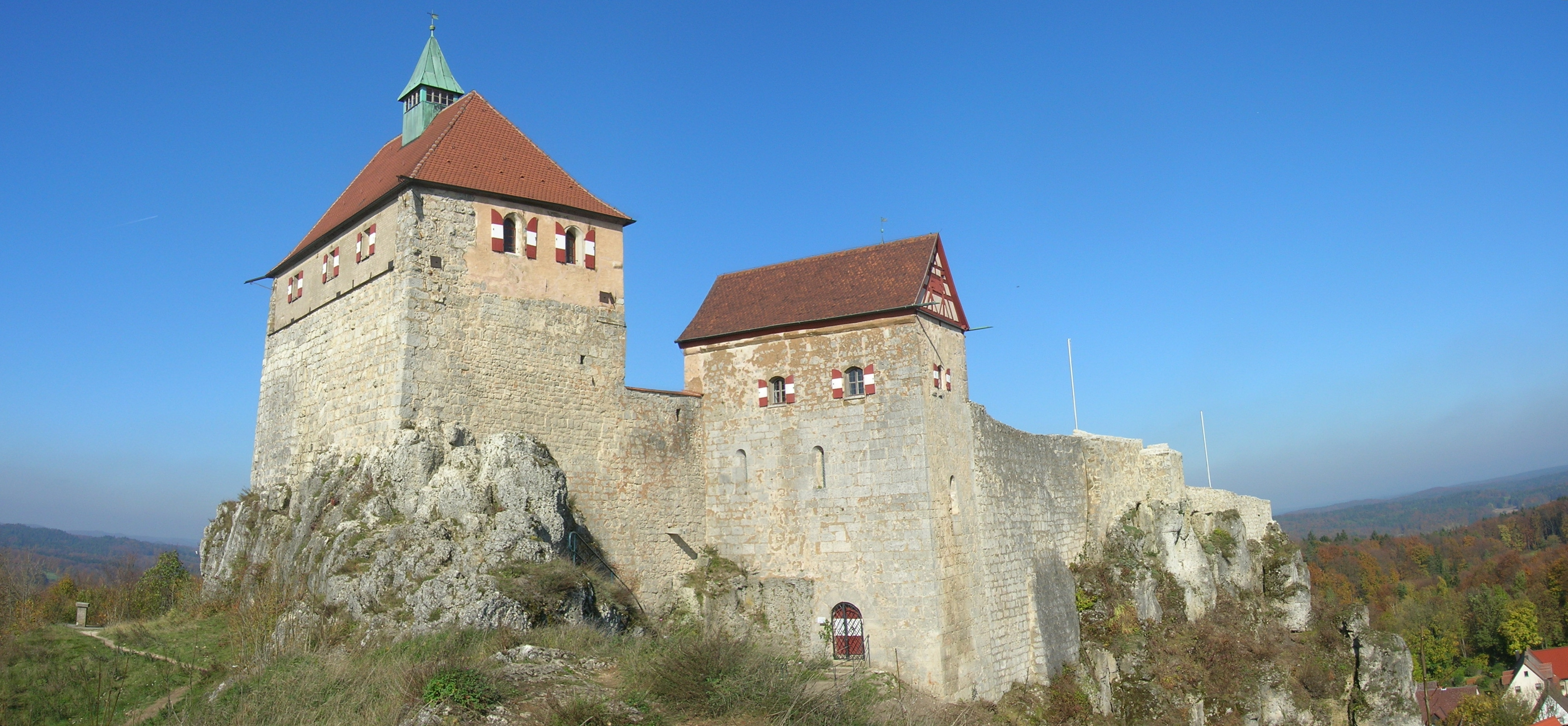 Ansicht der Oberburg von Burg Hohenstein